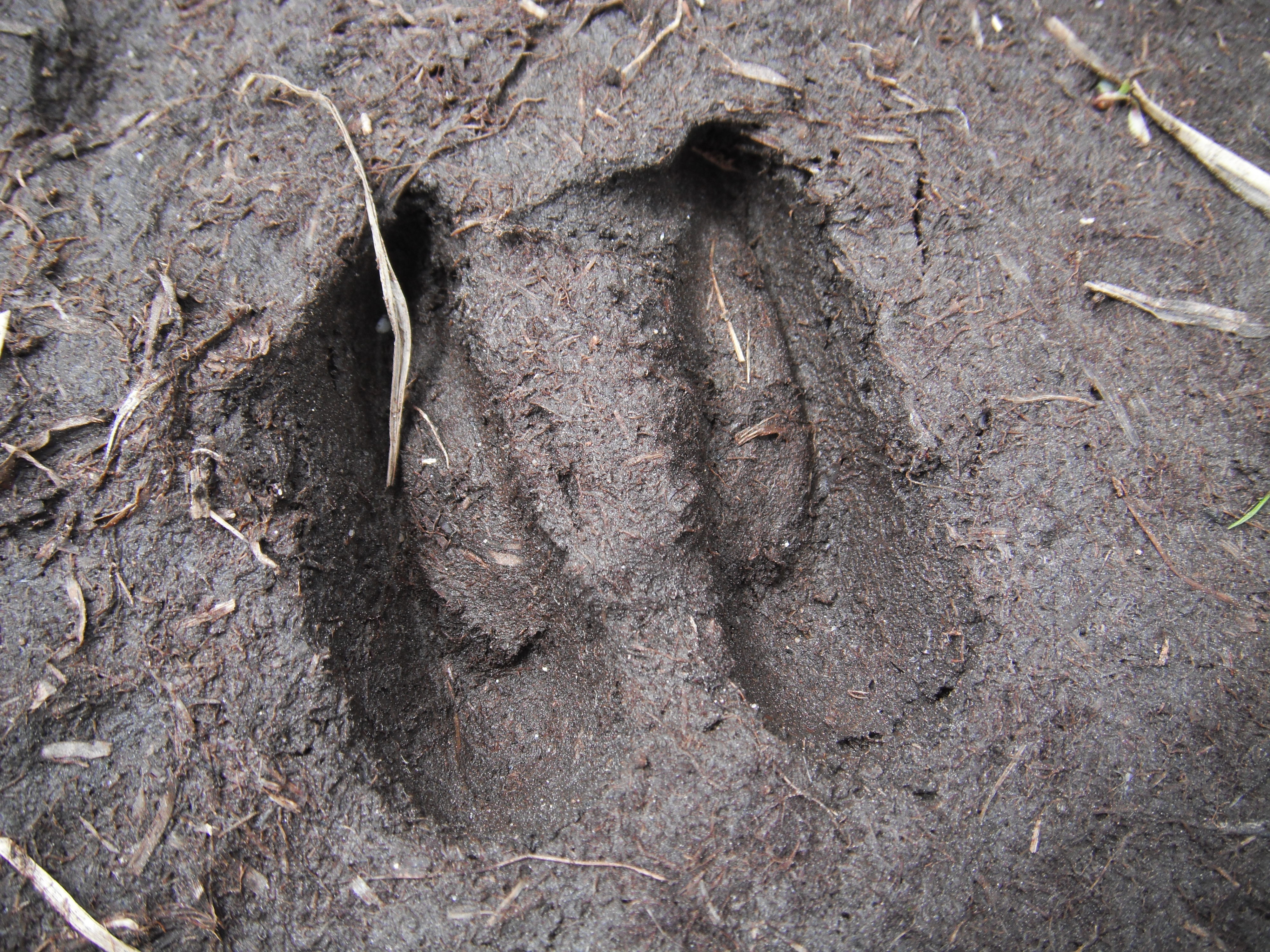 Рила, Рила Следа на дива коза (Rupicapra rupicapra), по пътя за вр. Мальовица